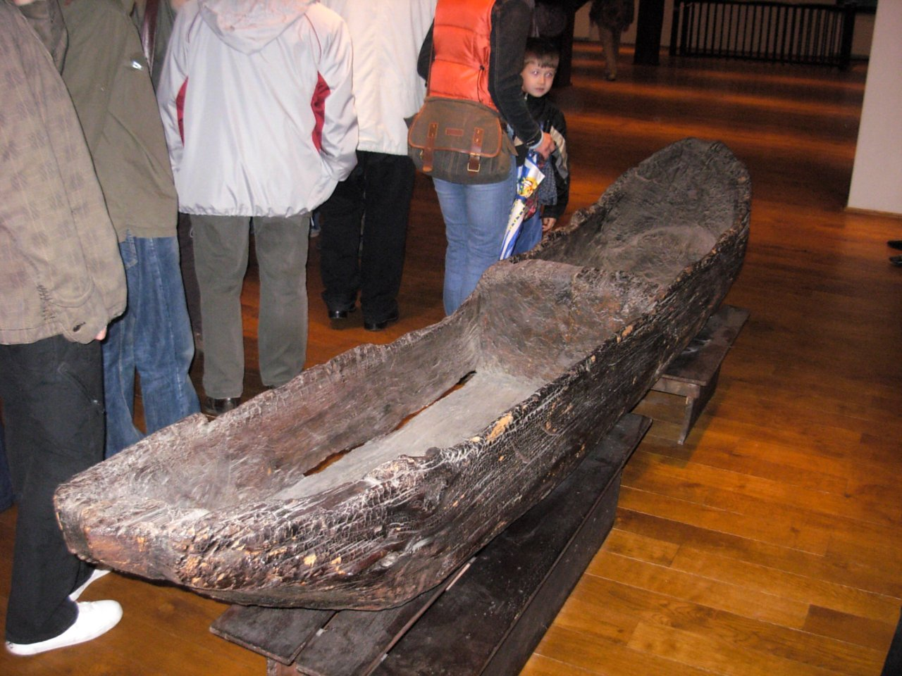 Łódź dłubanka z XI w. ze zbiorów Muzeum Okręgowego w Bydgoszczy